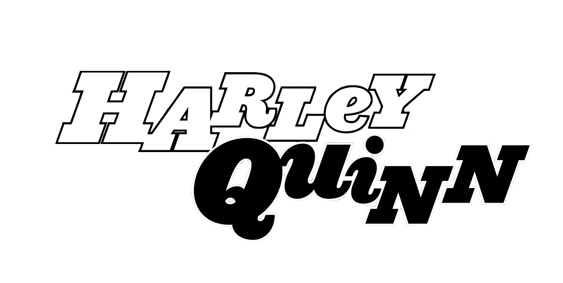 Logo del segundo y tercer volumen de Harley Quinn.